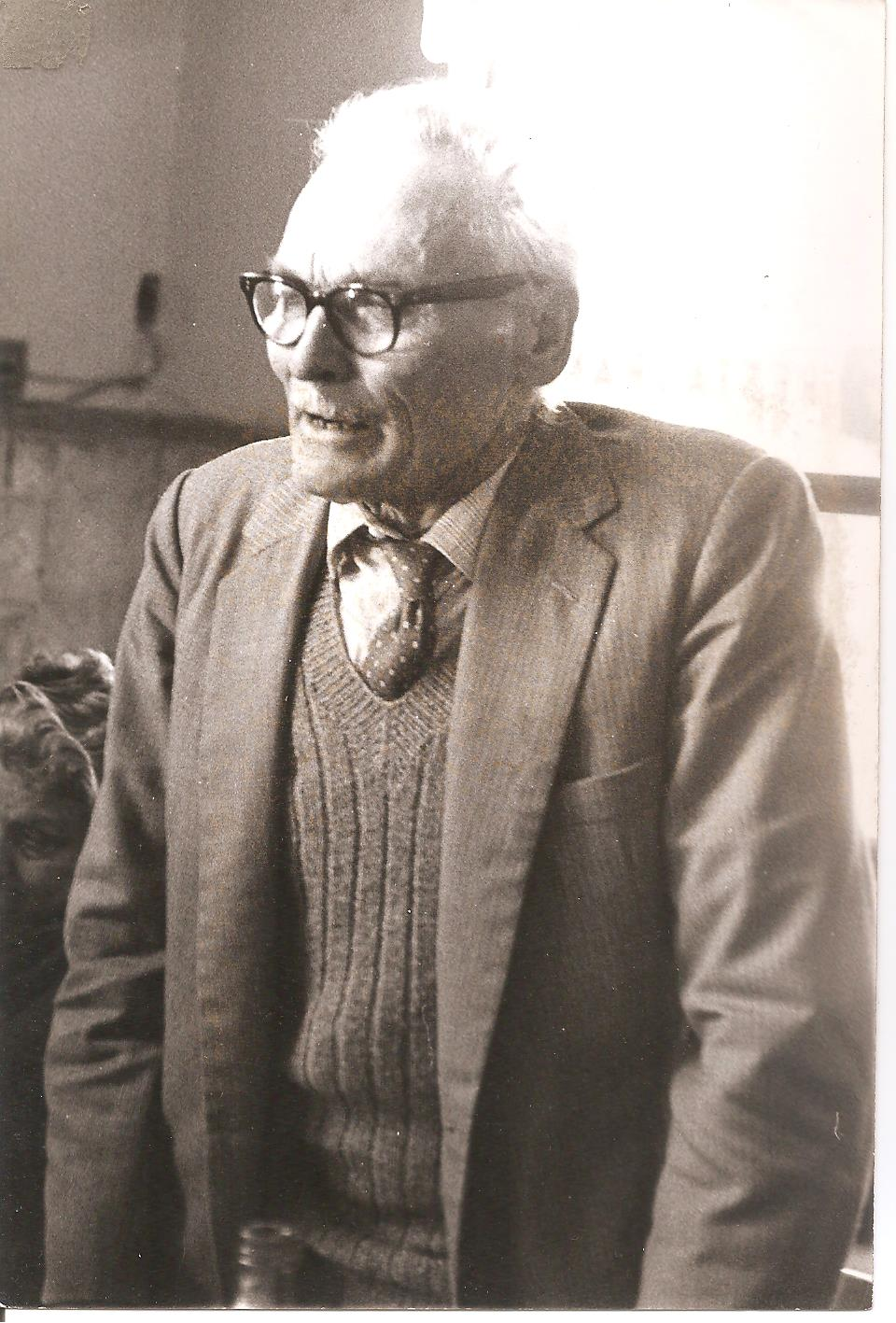 Fotografía de 1968 de Pedro Chiarante, sindicalista y político argentino